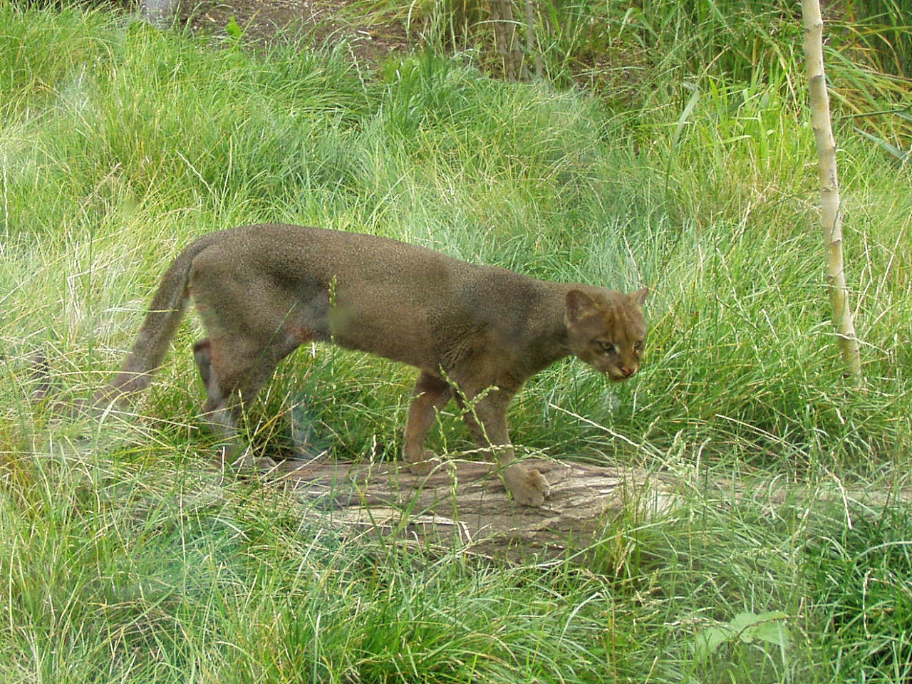 Puma yaguarondi (Prague Zoo)